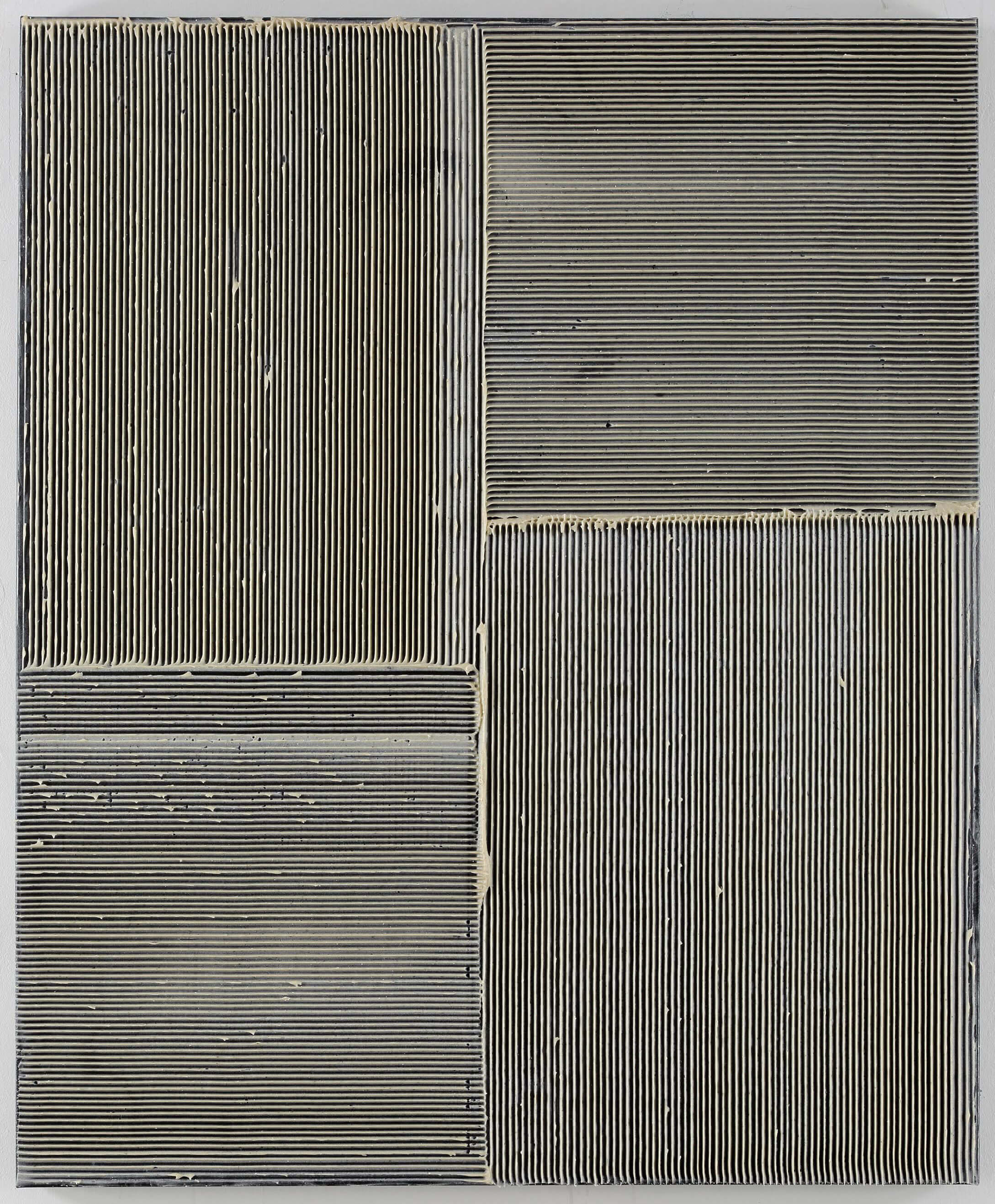 Abbildung eines Werkes von Jakob Gasteiger. Acryl auf Leinwand 140 x 115 cm